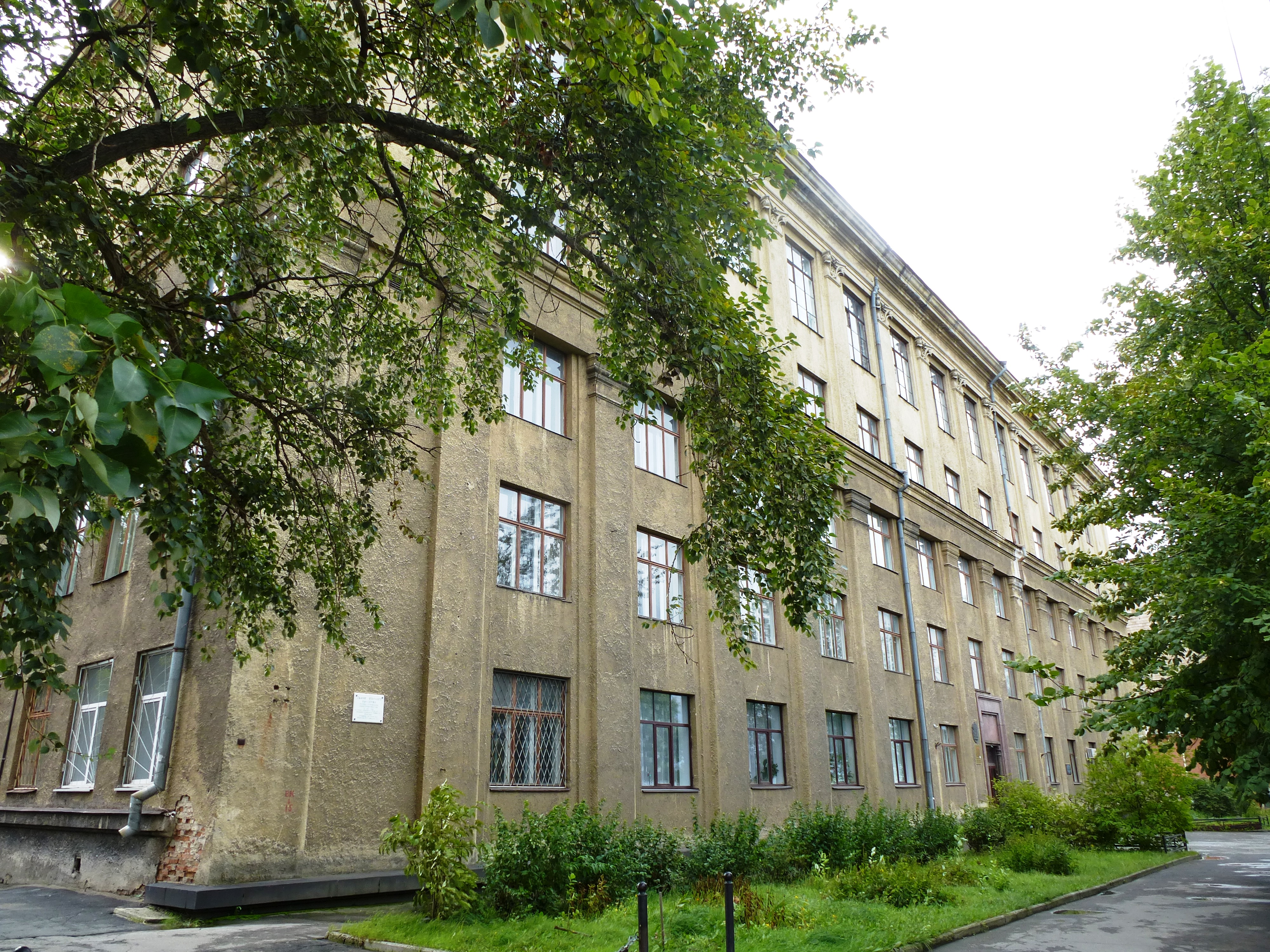 Здание Педагогического института в Петрозаводске на ул.Пушкинской (построено в 1962 году, архитектор Ф.И.Рехмуков)